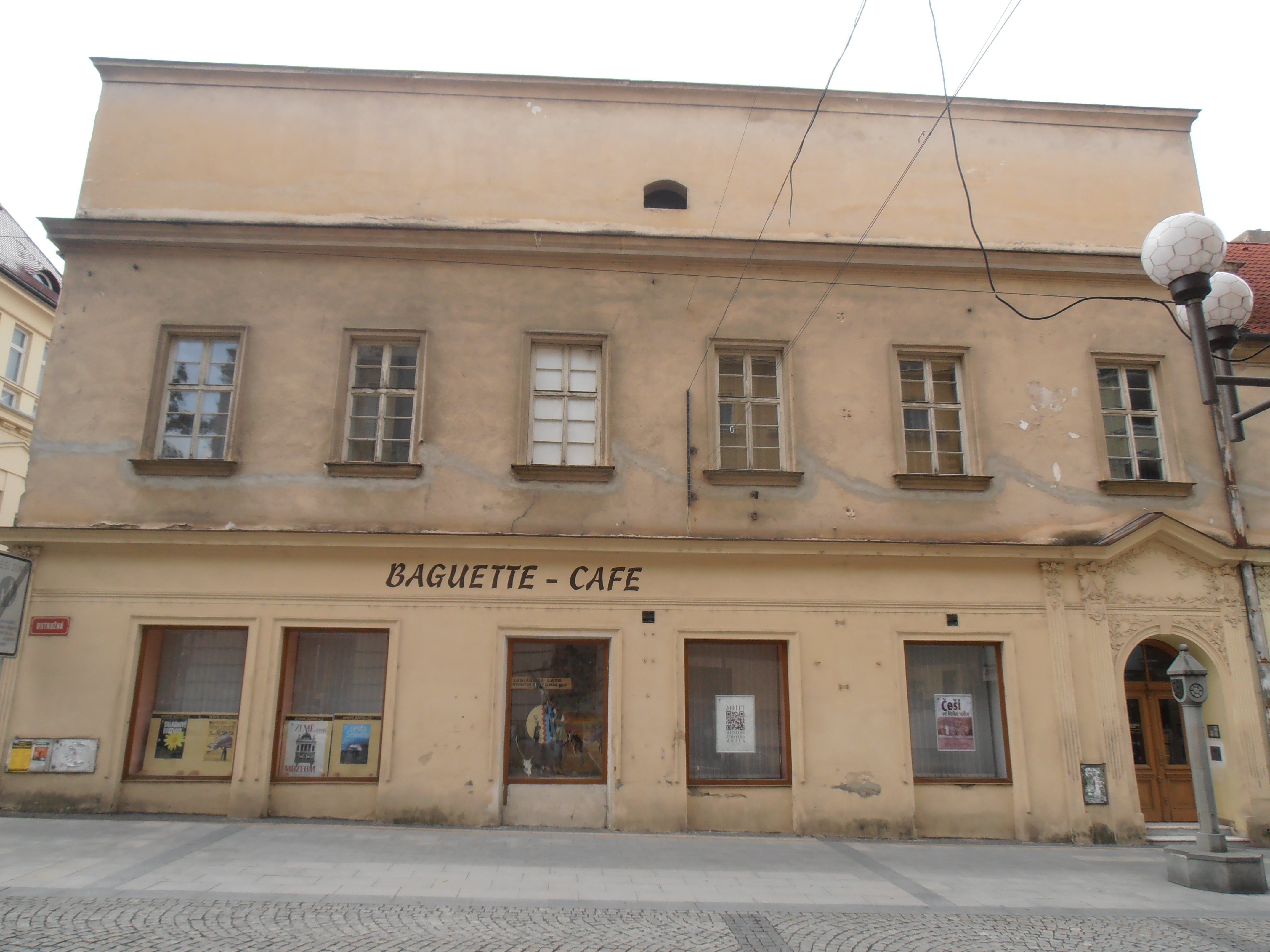 Bývalý bernardinský klášter, Ostrožná 234/42, Beethovenova, Opava-Město, Opava.